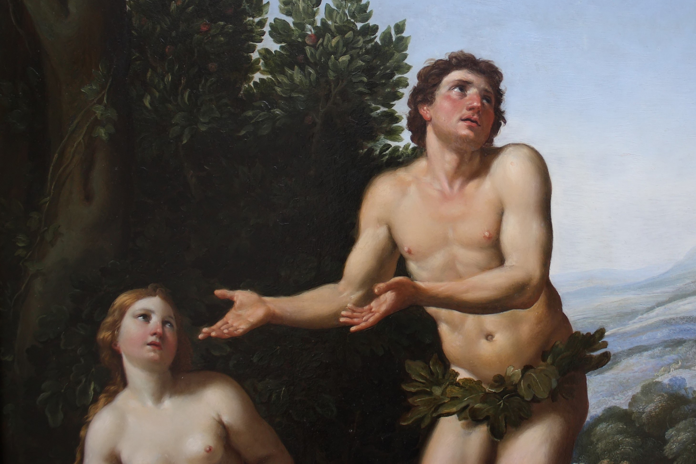 detail